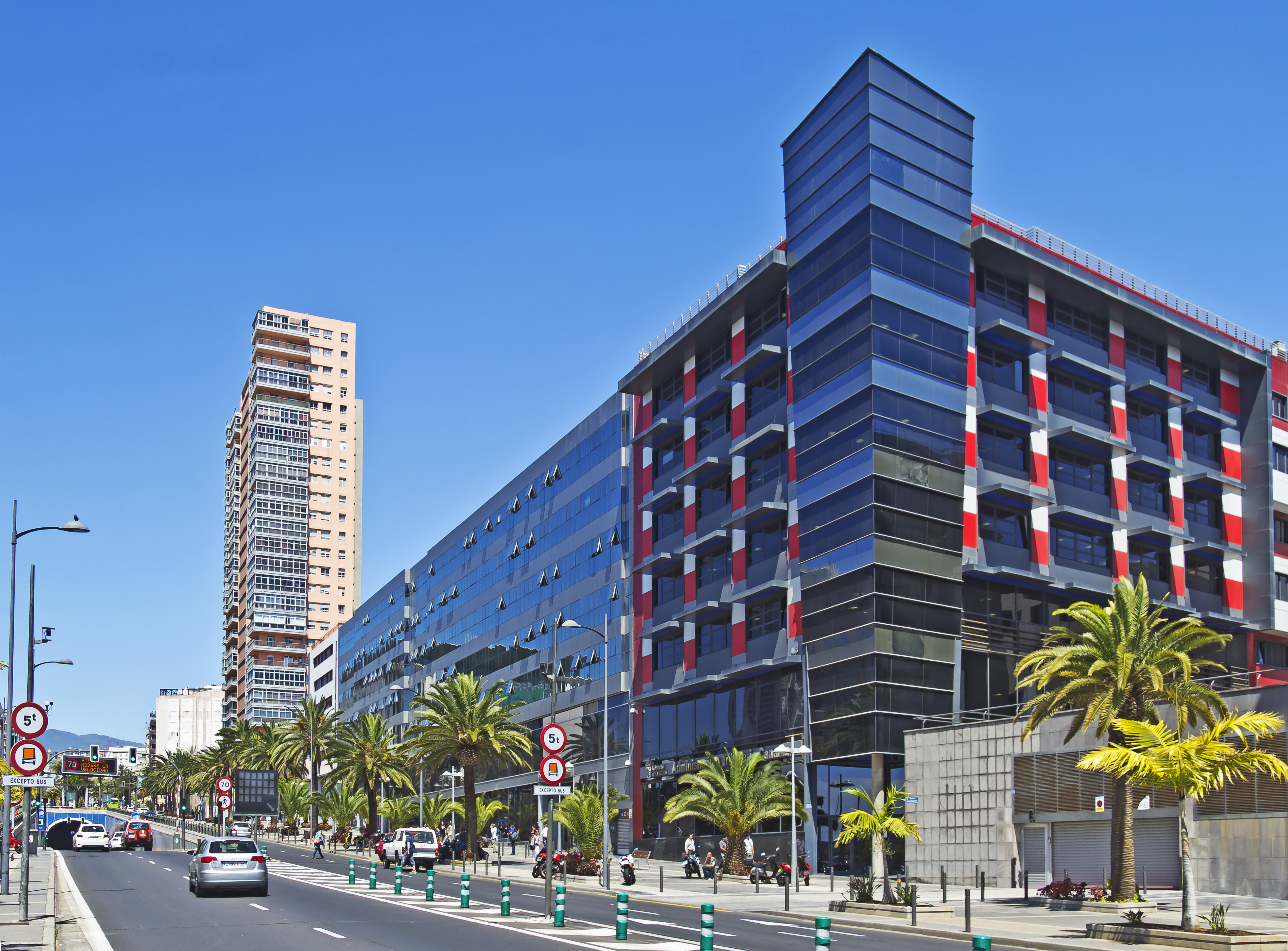 Einfahrt in den Tunnel der Avenida Tres de Mayo, Regierungsgebäude und Rascacielos